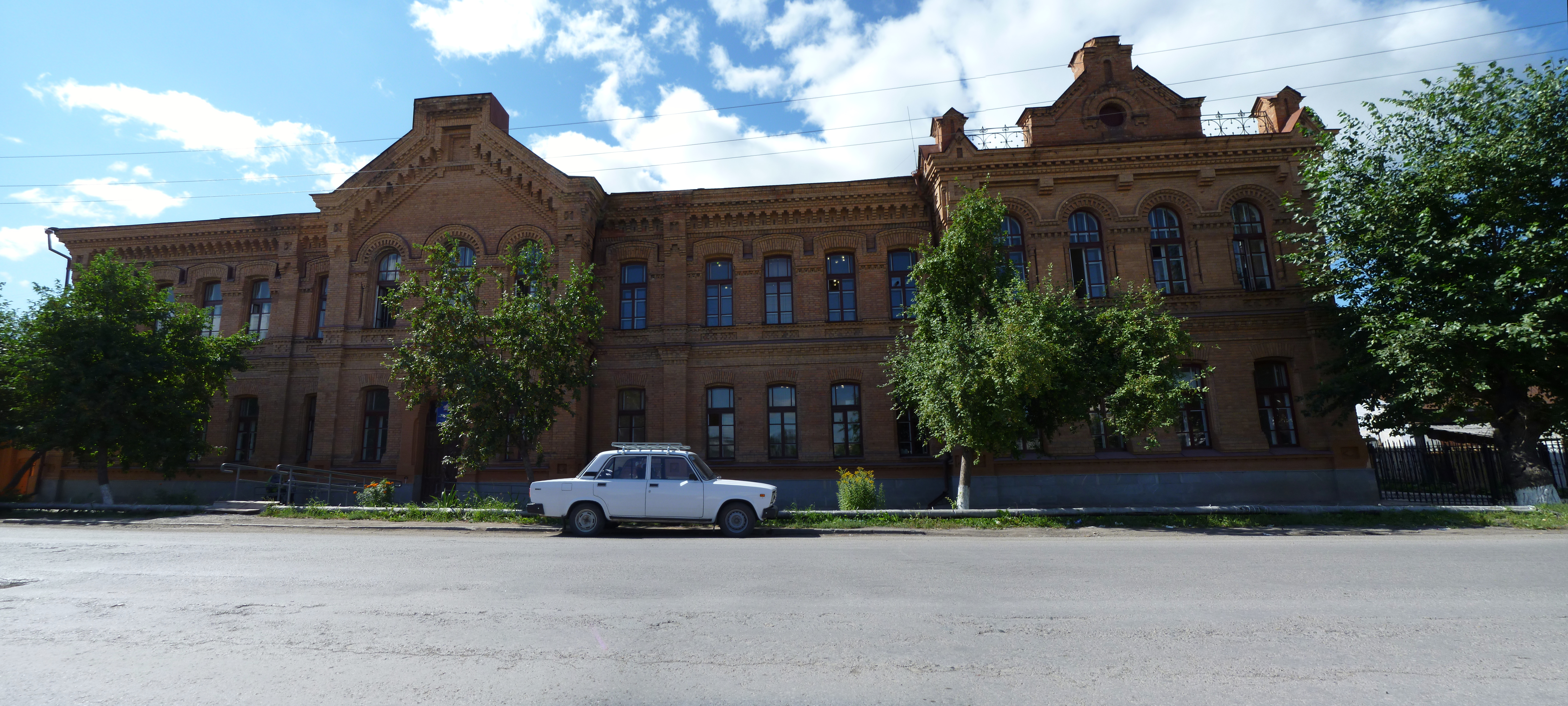 Здание Ирбитской женской гимназии, ныне ПФР Ирбита